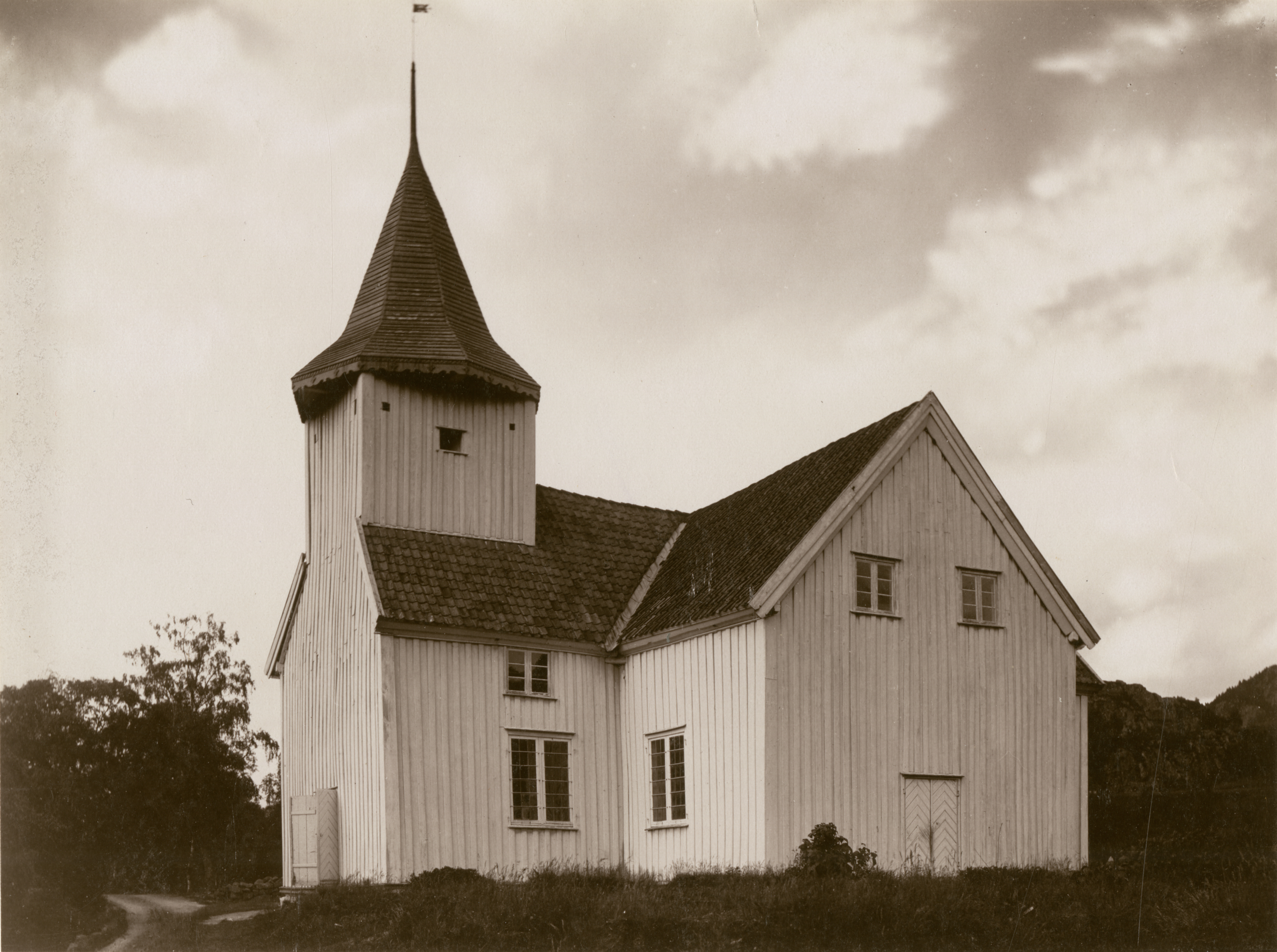 Bakke kirke i Flekkefjord, Vest-Agder